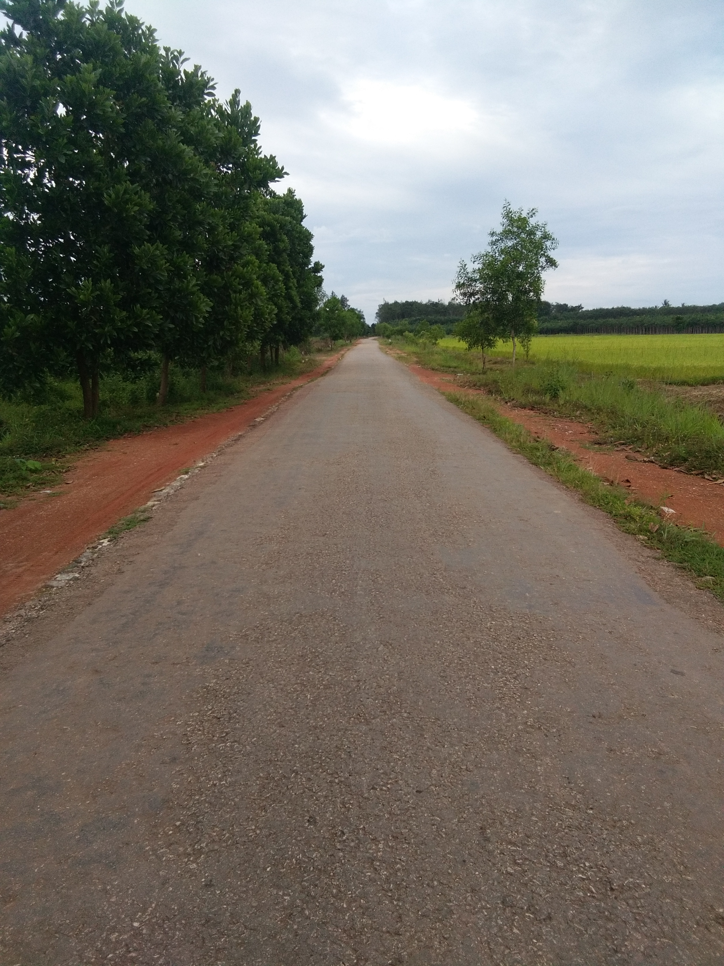 Wonraw Road